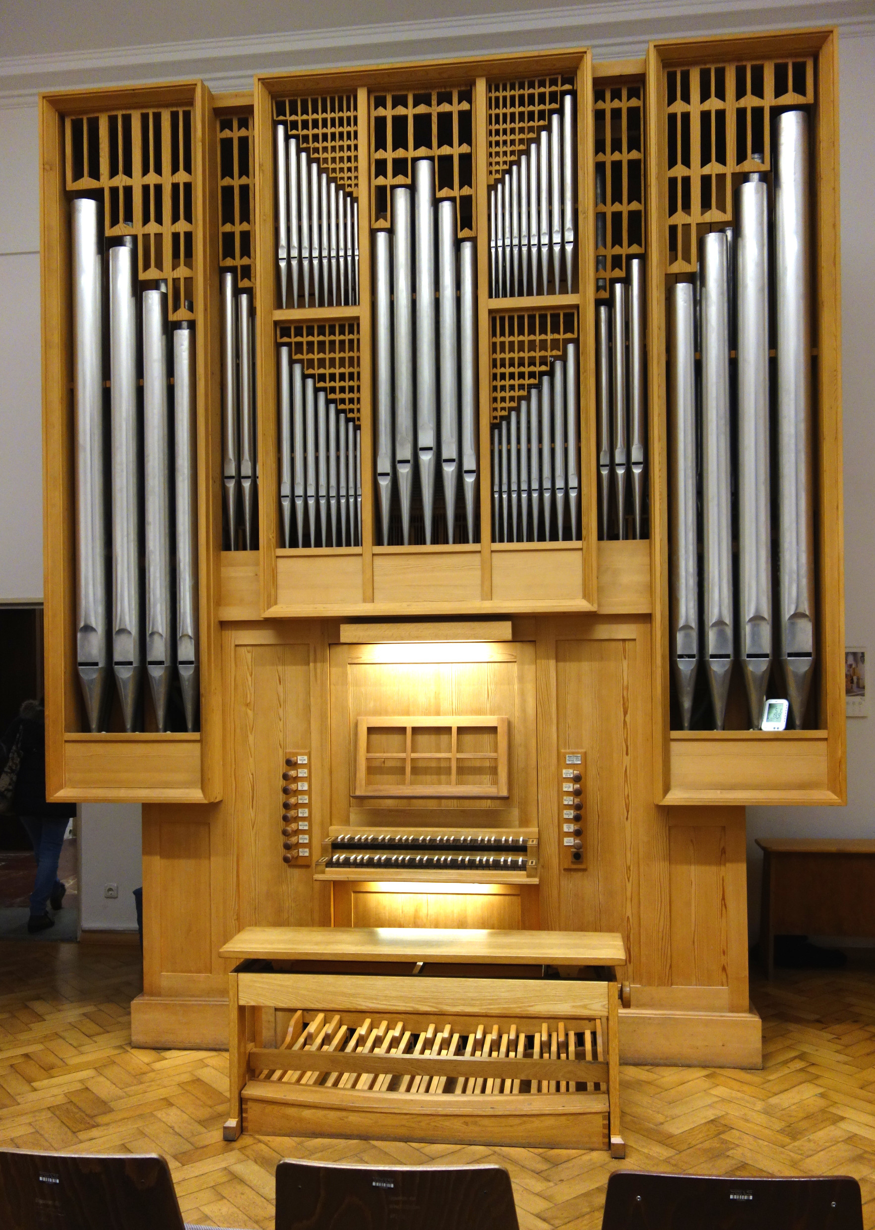 Pirchner-Orgel der Musikhochschule München (1981, Pirchner, II/13)